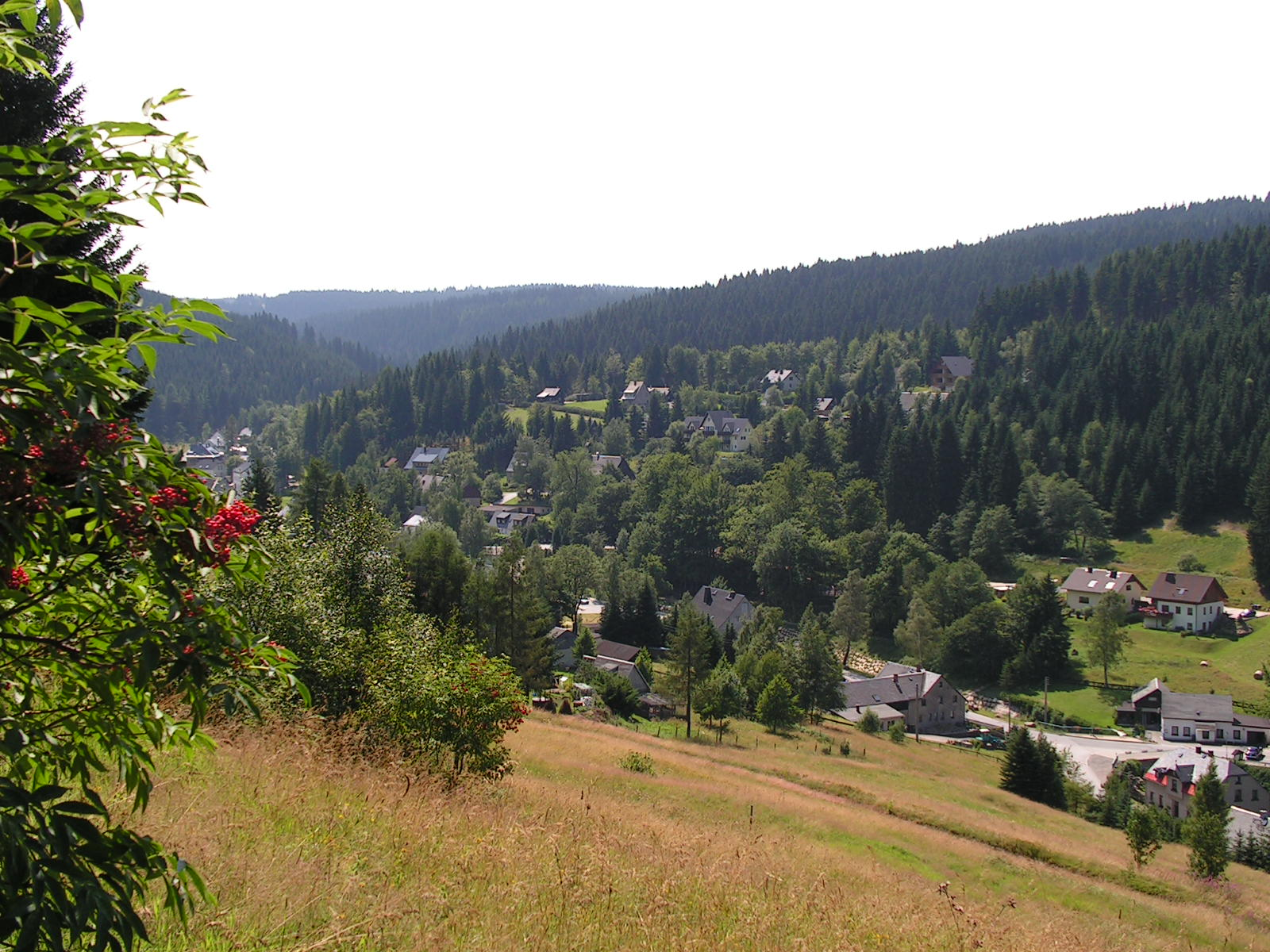 Wildenthal am Fuße des Auersberges, Urheber: --Der WildenThaler